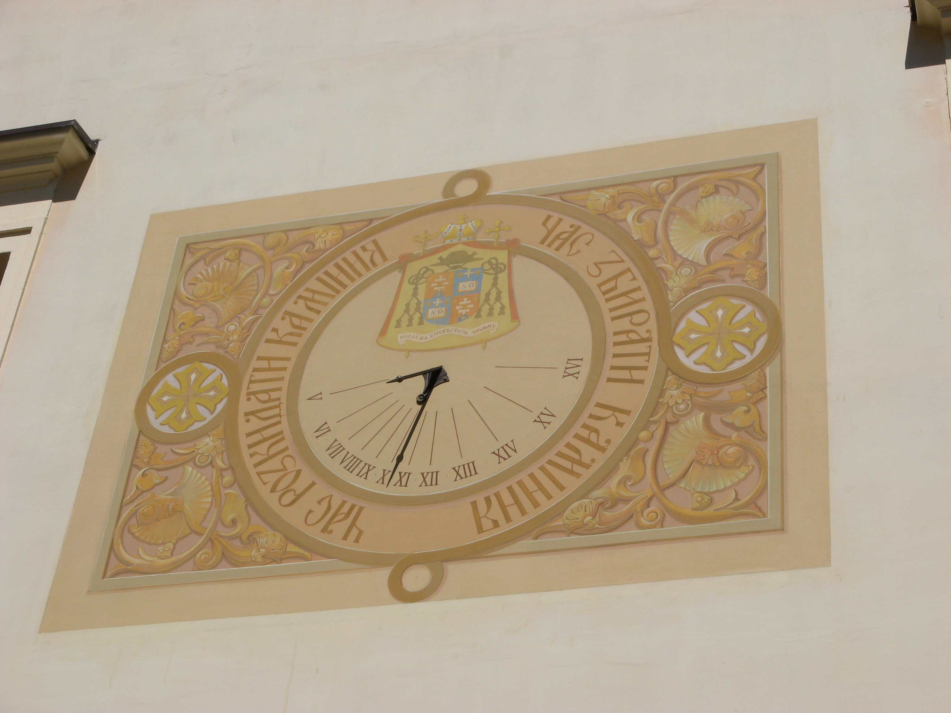 Сонячний годинник (Ужгородський кафедральний собор)